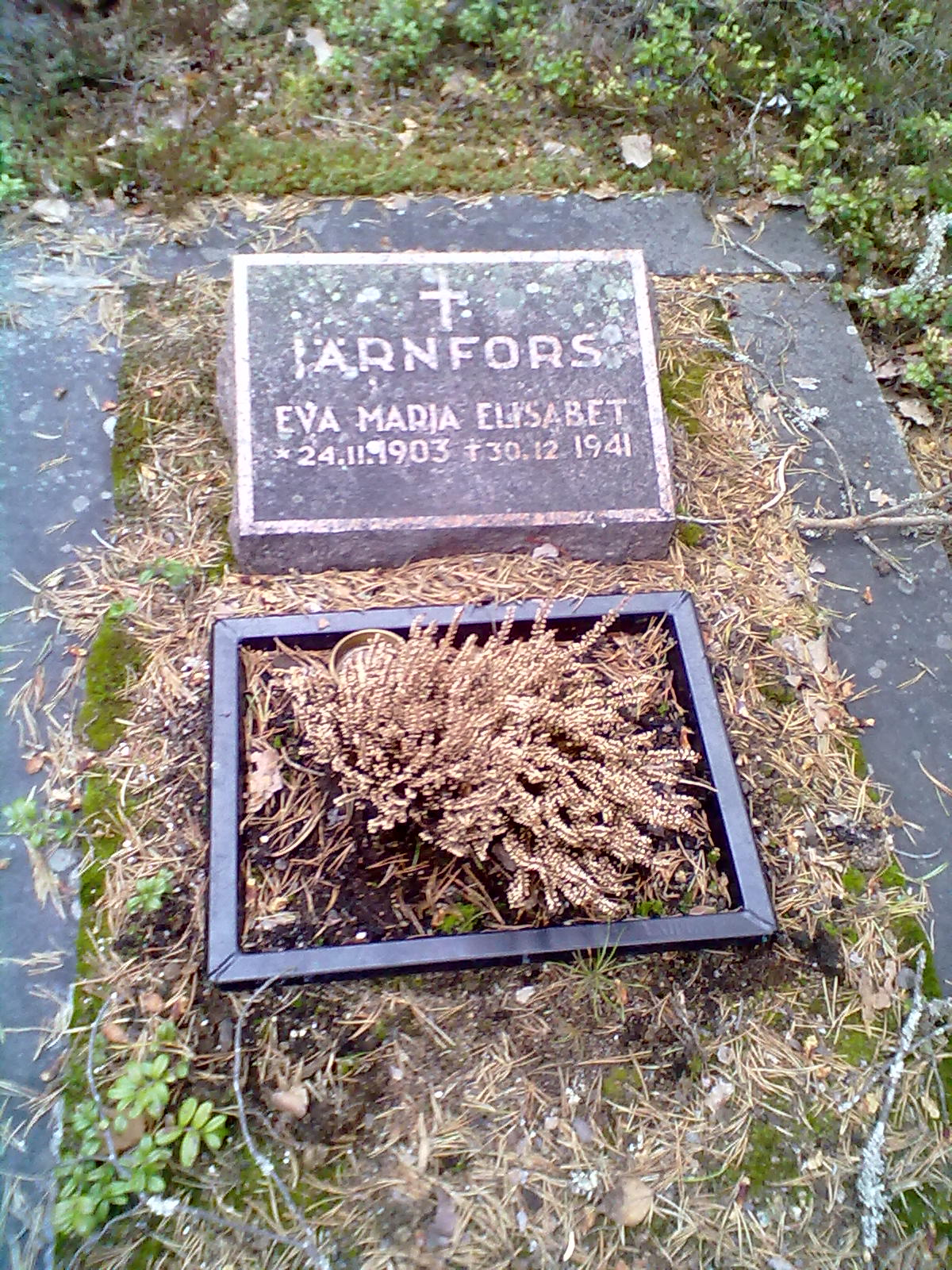 Ristikankaan hautausmaan toisen vainajan Eva Järnforsin hautakivi.